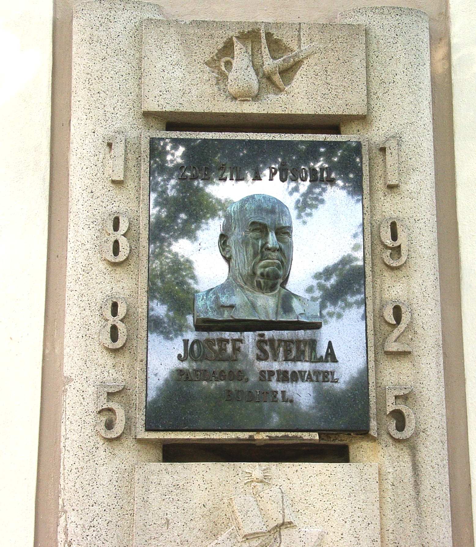 Pamětní deska pedagoga Josefa Švehly, detail